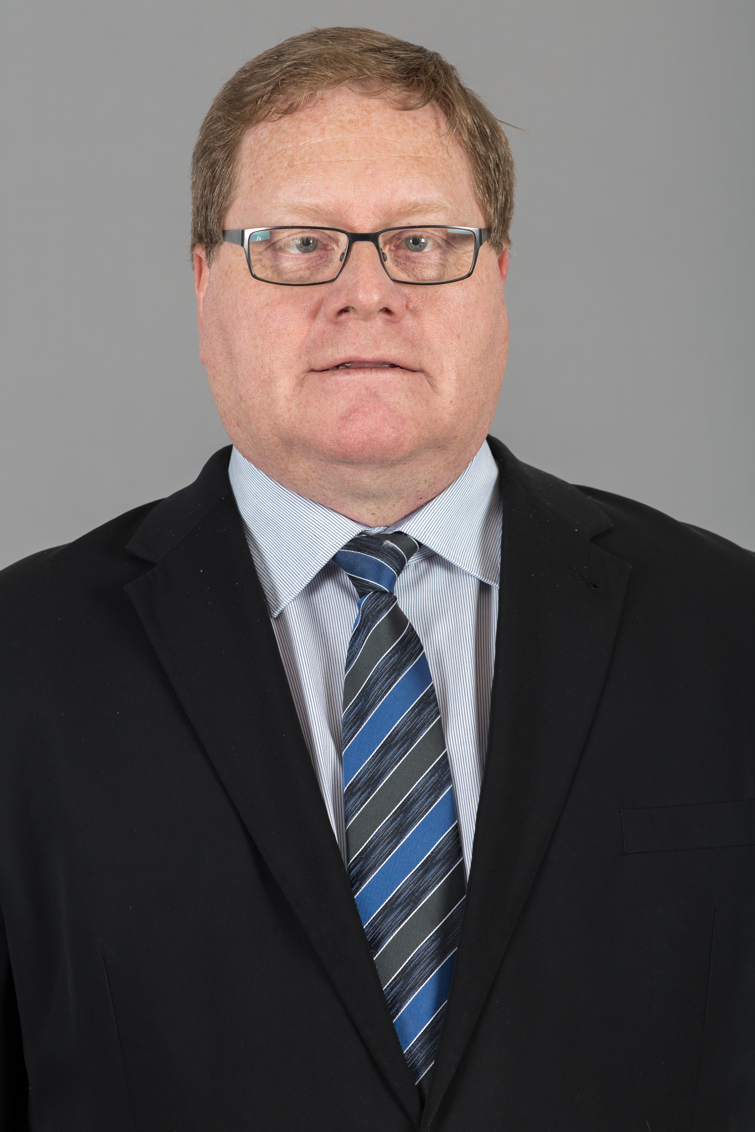 Jörg Henke